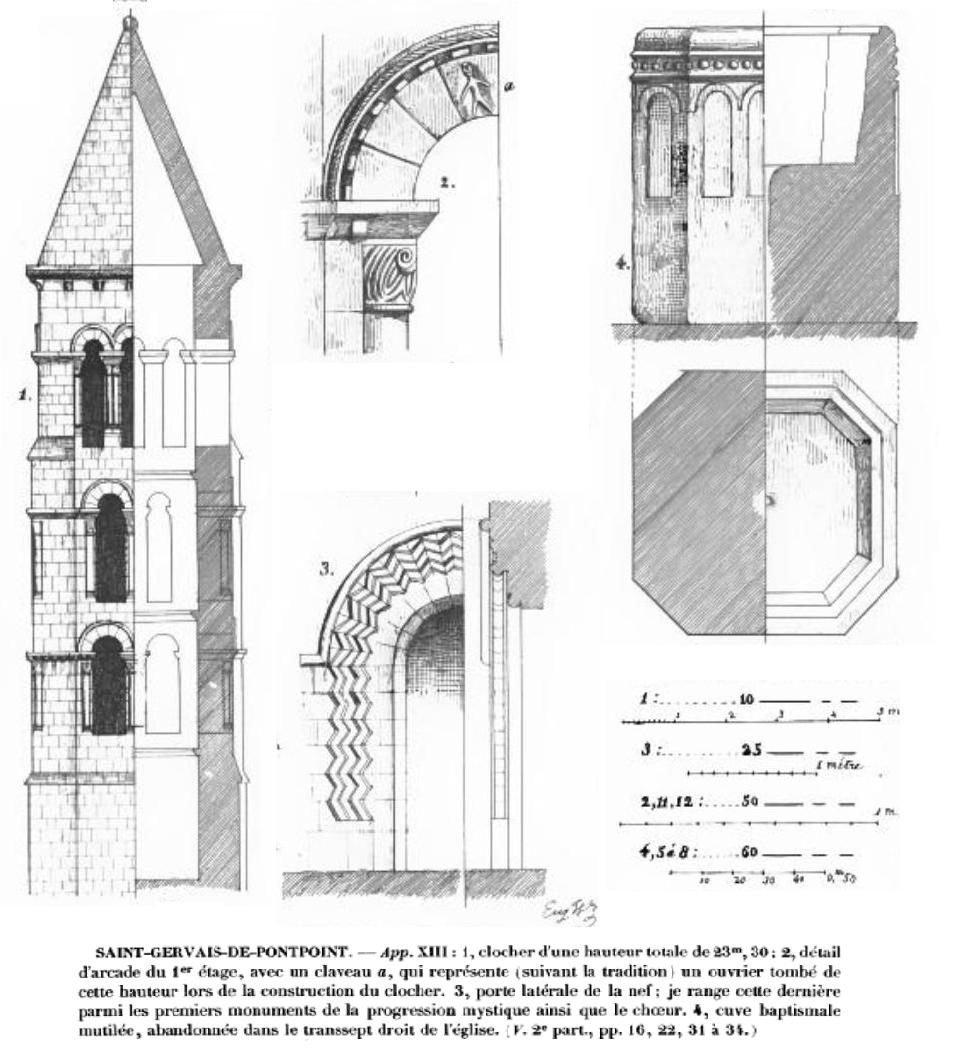 Croquis d'architecture relevés sur place par Eugène Woillez ; voir l’illustration pour la légende.